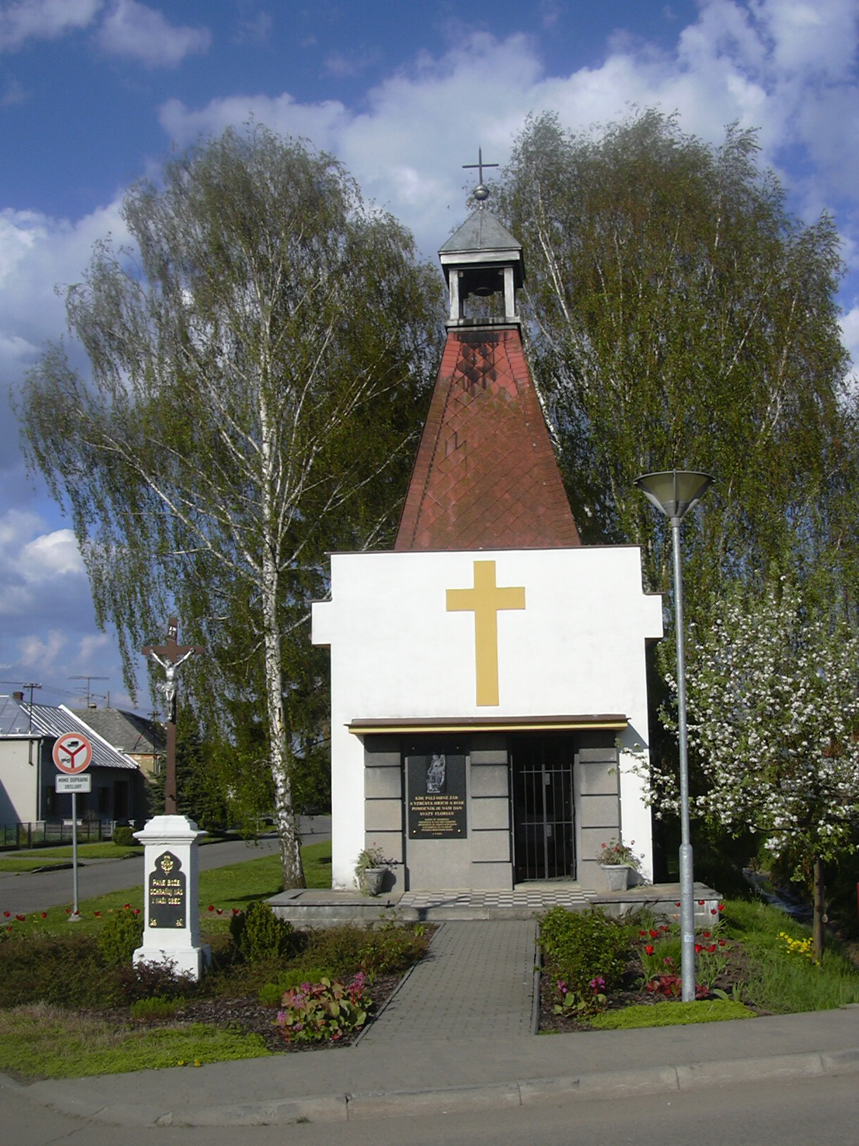 Kaple sv. Floriána, Hlubočany (Vyškov District - Czech Republic)